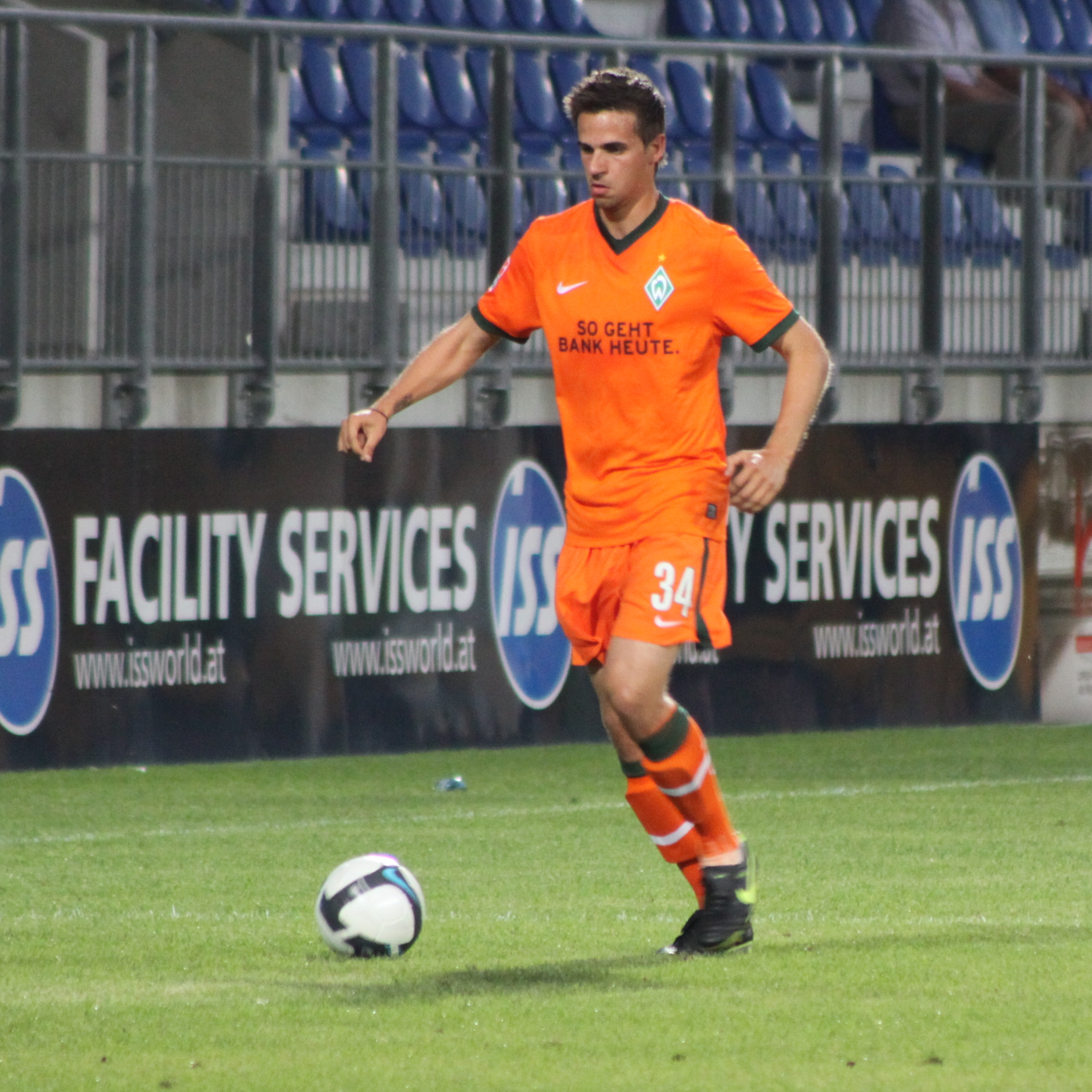 Martin Harnik - SV Werder Bremen (3)